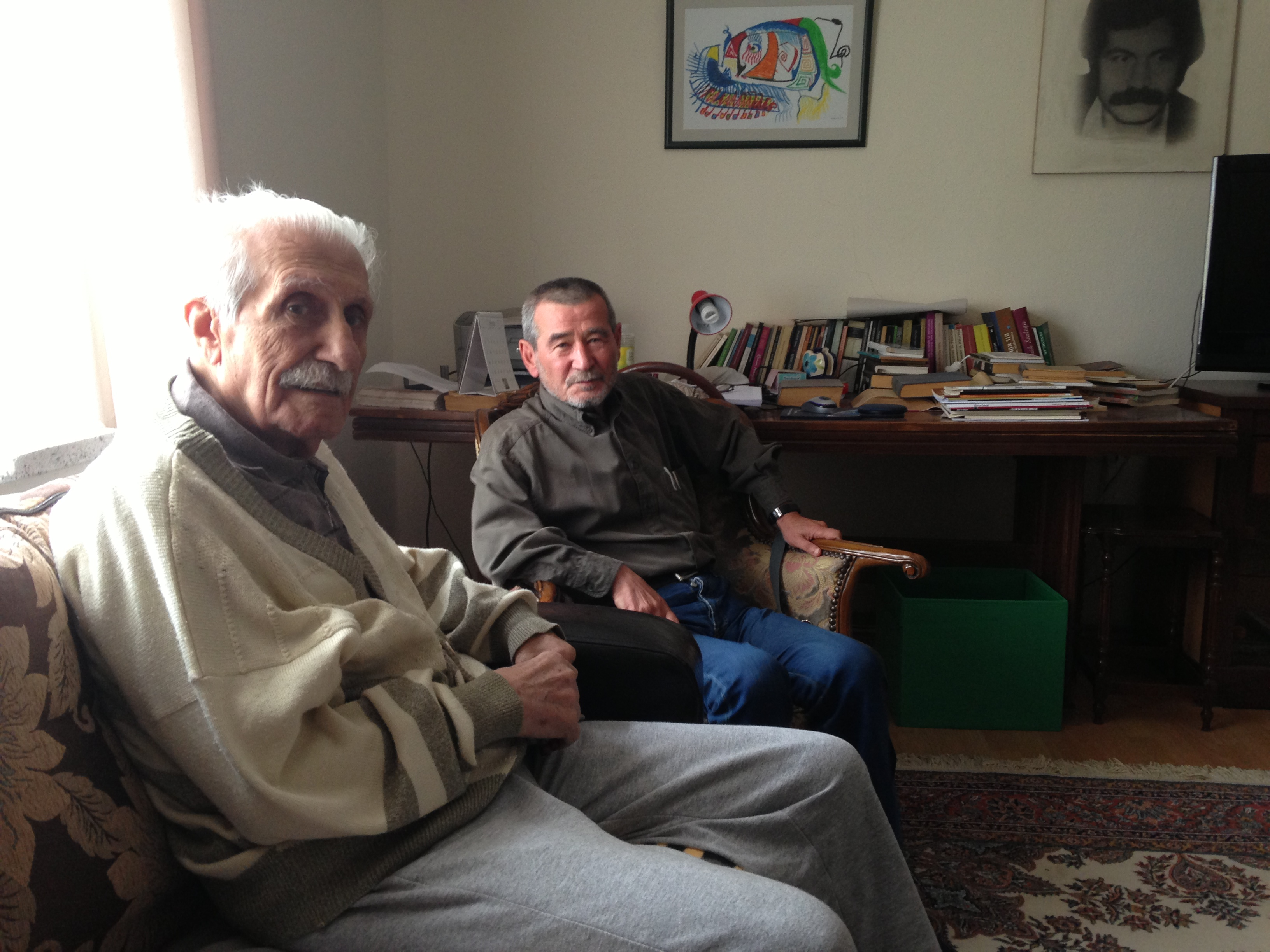 Ahmet Telli Vecihi Timuroğlu ile Kazan/Ankara'da 17 Eylül 2013